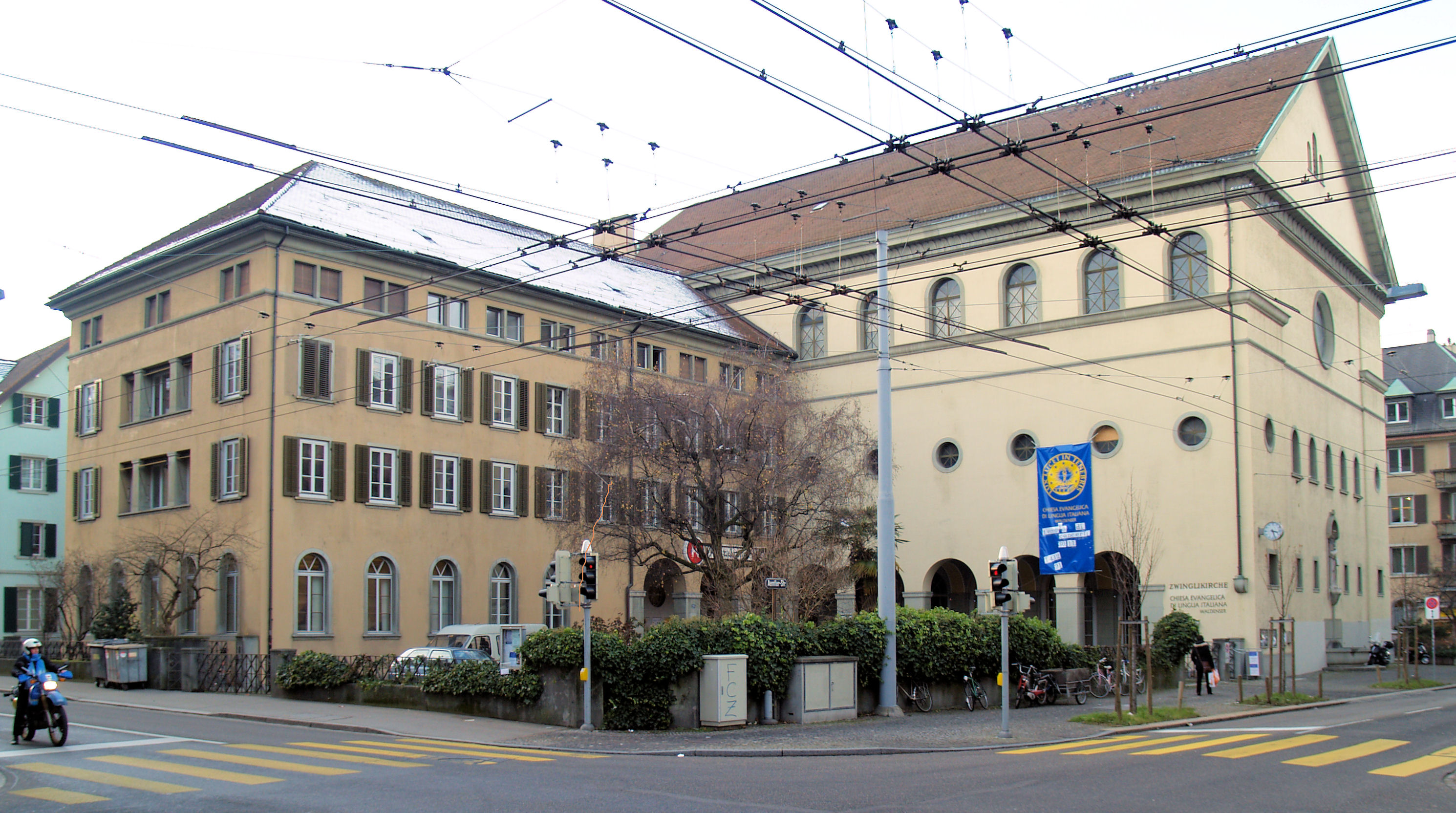 Zwinglikirche in Zürich Wiedikon (turmlose Kirche)